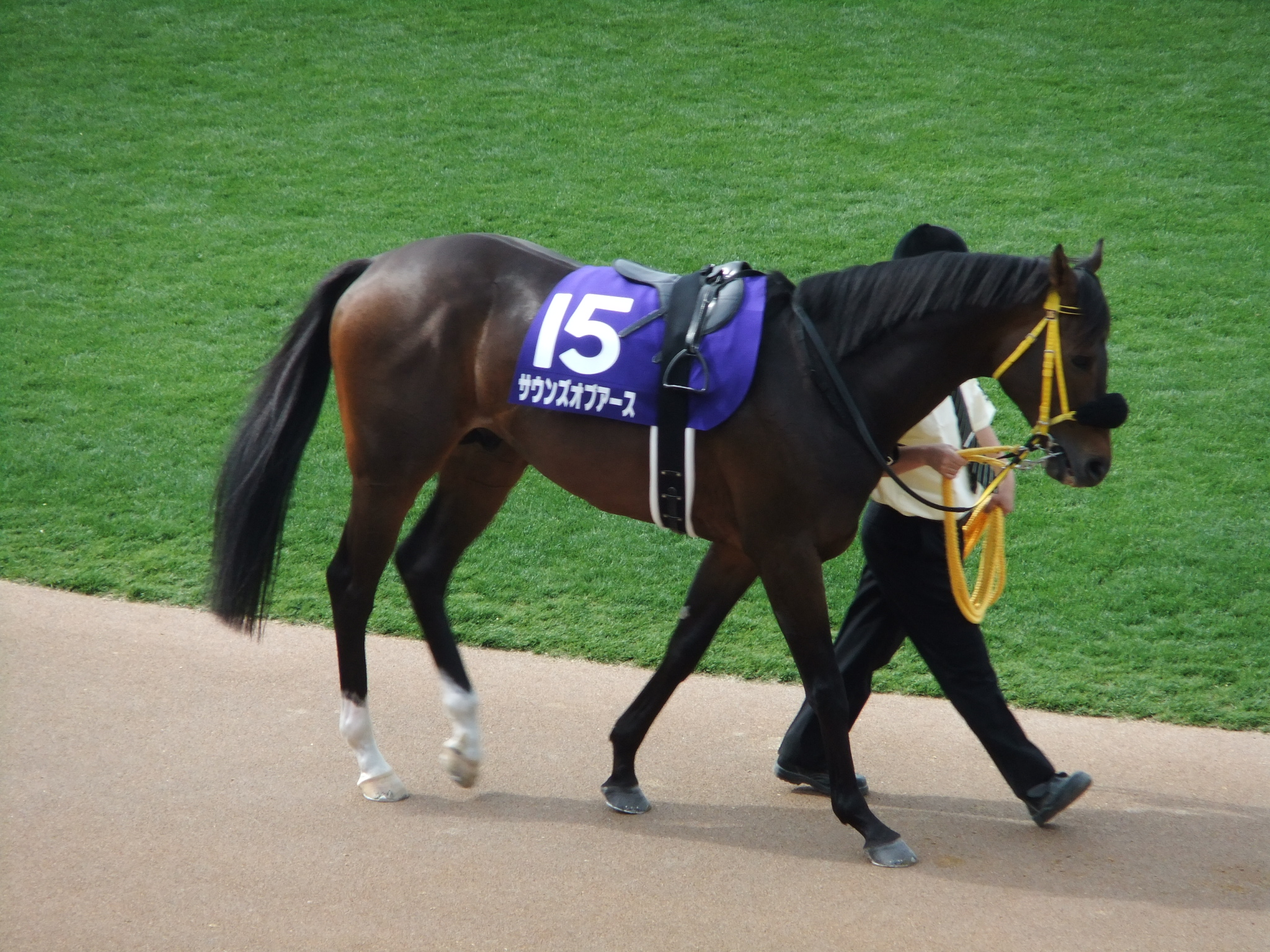 サウンズオブアース